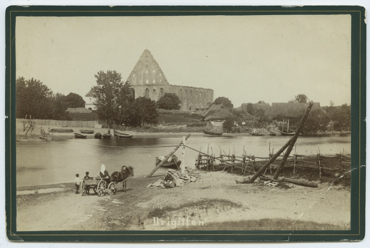 MuuseumikogufotodOlemusfotoOriginaaloriginaalSäilivushea